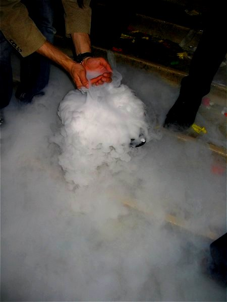 Nebelerzeugung mit Trockeneis